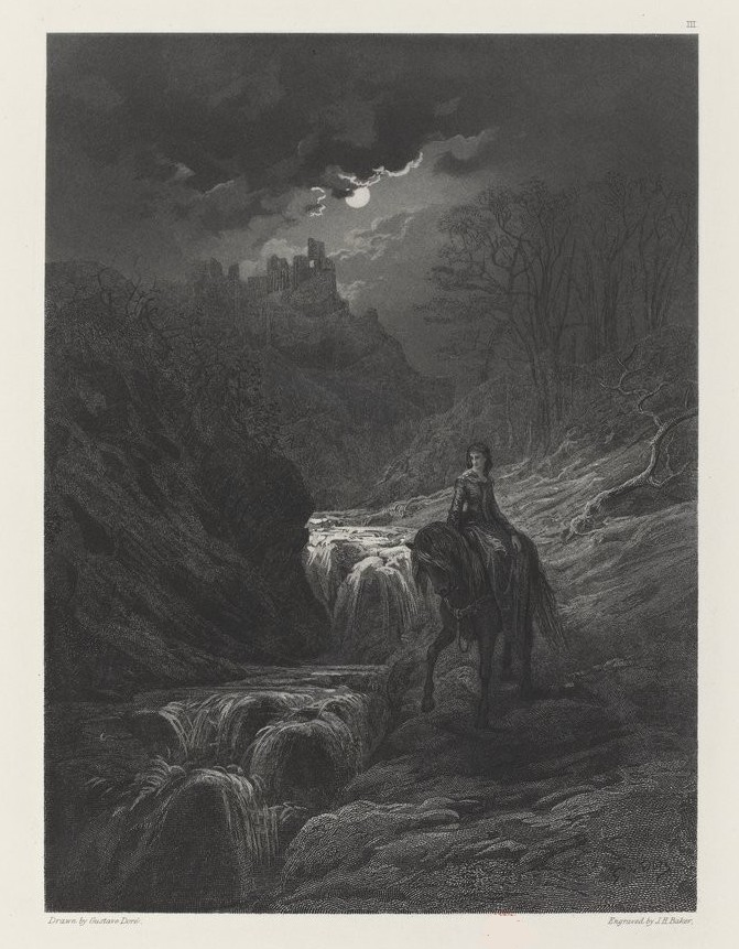 "Elle s'enfuit à Almesbury, et resta en route pendant toute une nuit", dessin de Gustave Doré pour illustration du poéme "Genièvre" de Alfred Tennyson